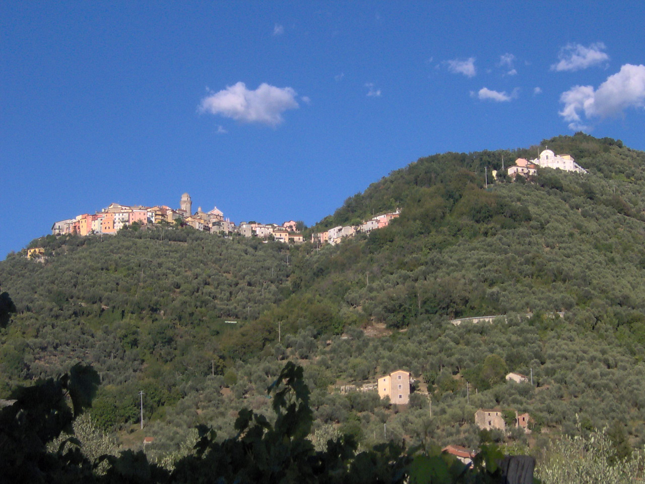 Ortonovo - Il borgo